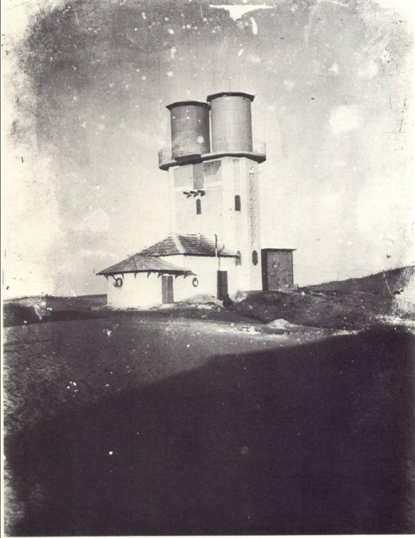 בית הוועד